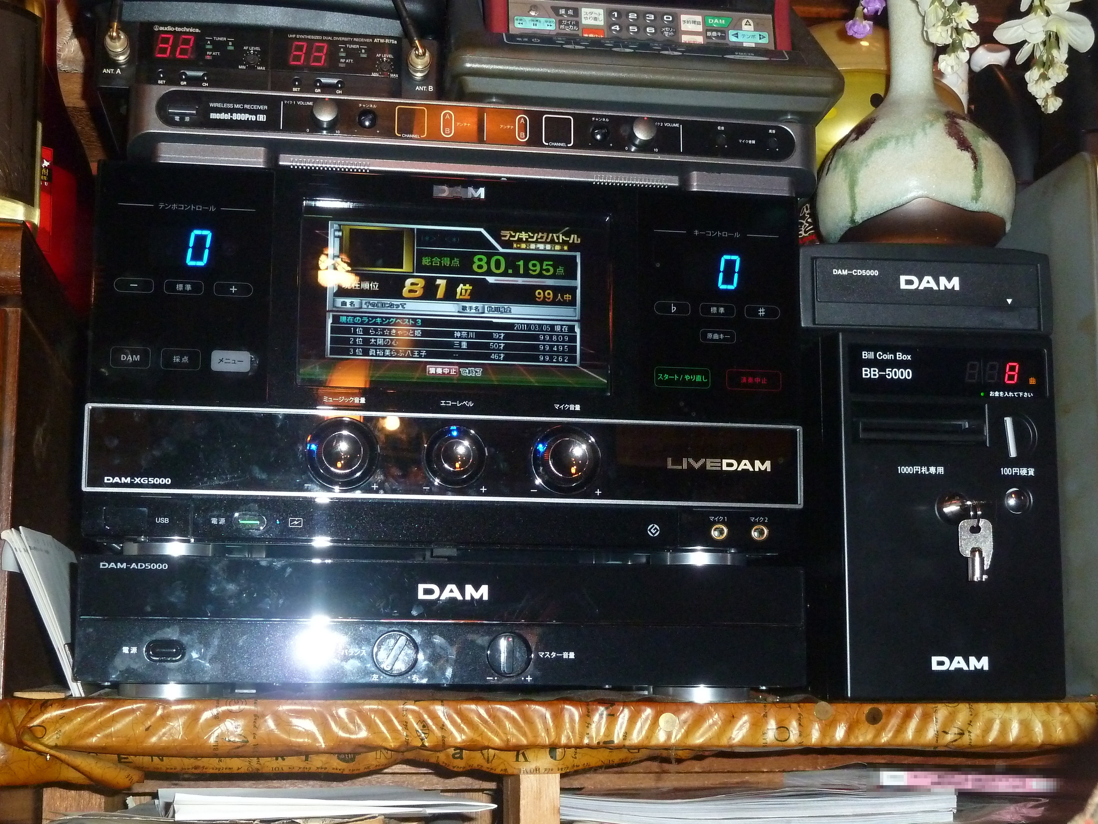 第一興商のLIVE DAM（ライブダム）、DAM-XG5000 北海道弟子屈町の、和風スナック『からまつ』で許可を得て撮影